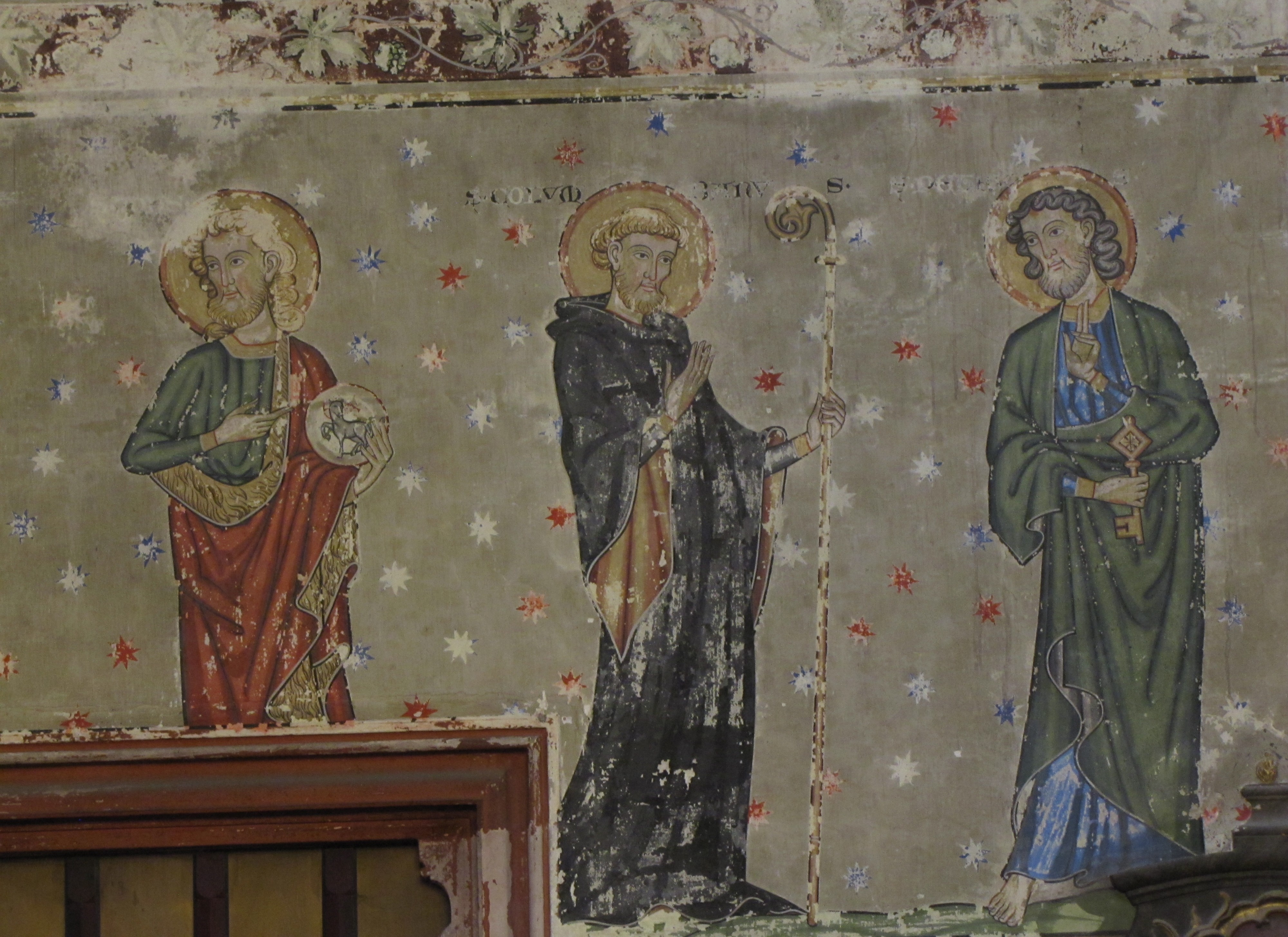 Alsace, Bas-Rhin, Église protestante Saint-Pierre-le-Jeune de Strasbourg (PA00085030).Fresques néo-gothiques de la nef (XIXe): Jean-Baptiste, St-Colomban, St-Pierre (transept nord)